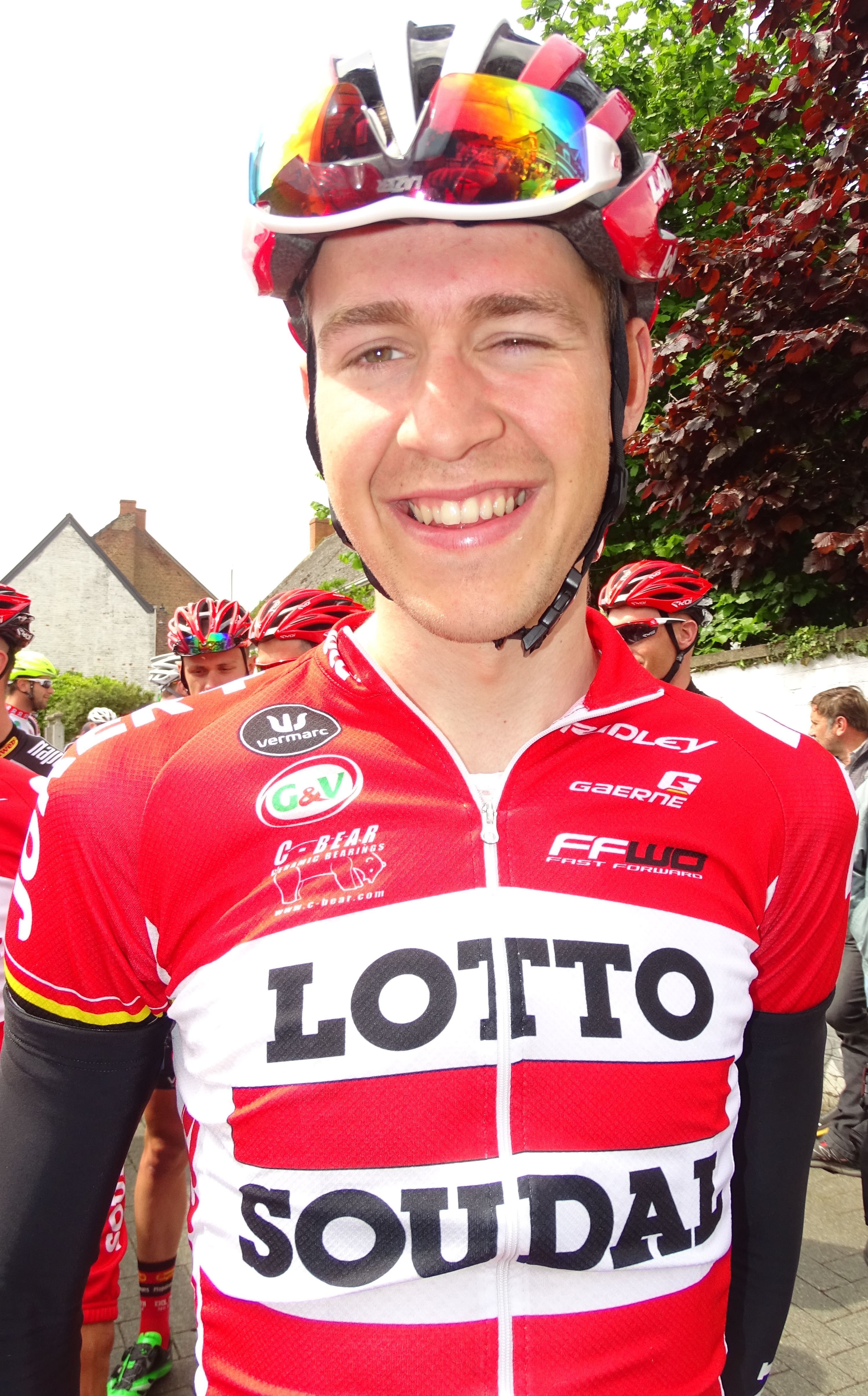 Reportage réalisé le dimanche 17 mai à l'occasion du départ du Grand Prix Criquielion 2015 à Silly, Belgique.